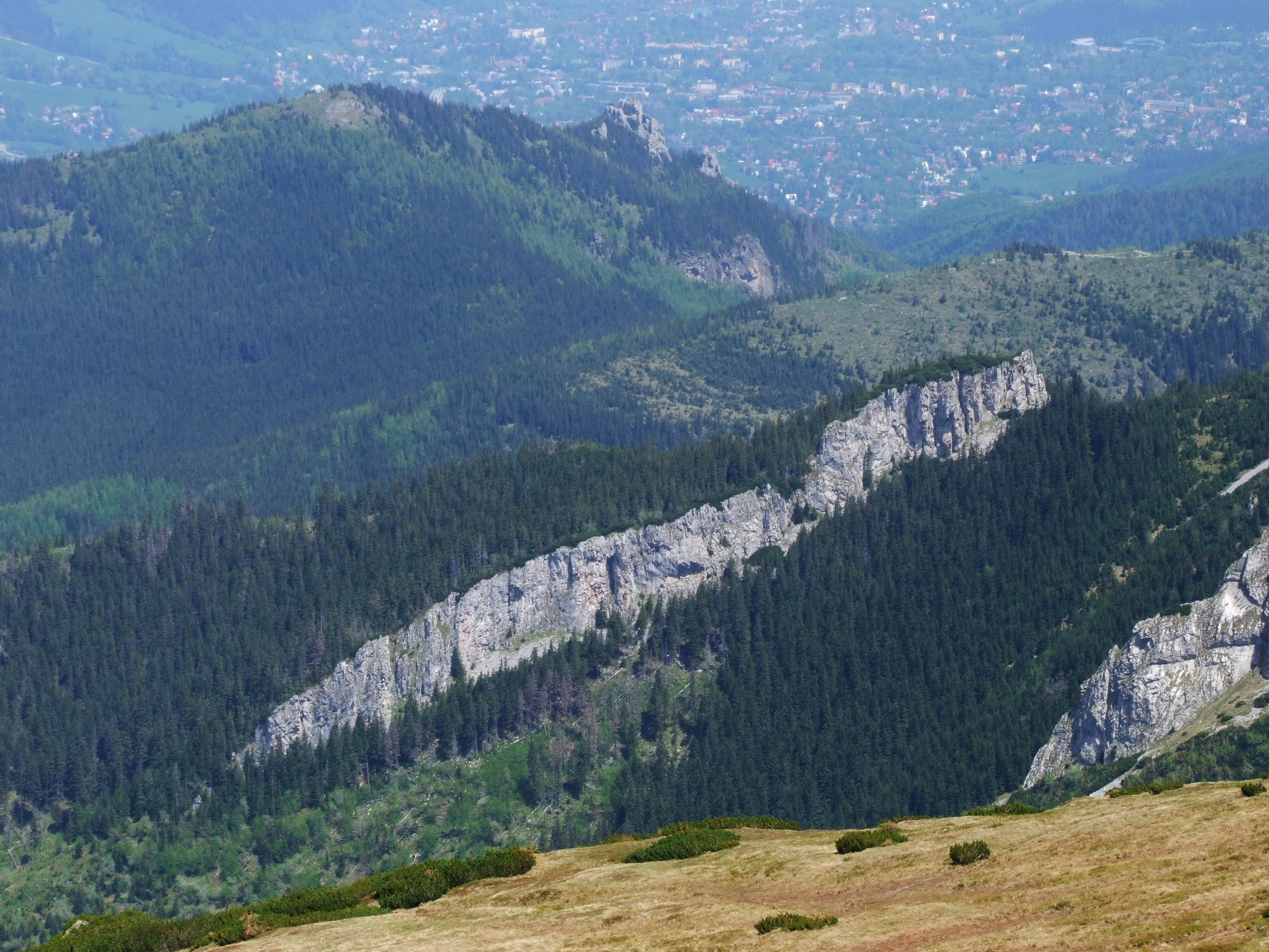 Łysanki i Grzybowiec, Skoruśniak Małołącki, Niedźwiedź, po jego prawej stronie Siwarowa Przełęcz